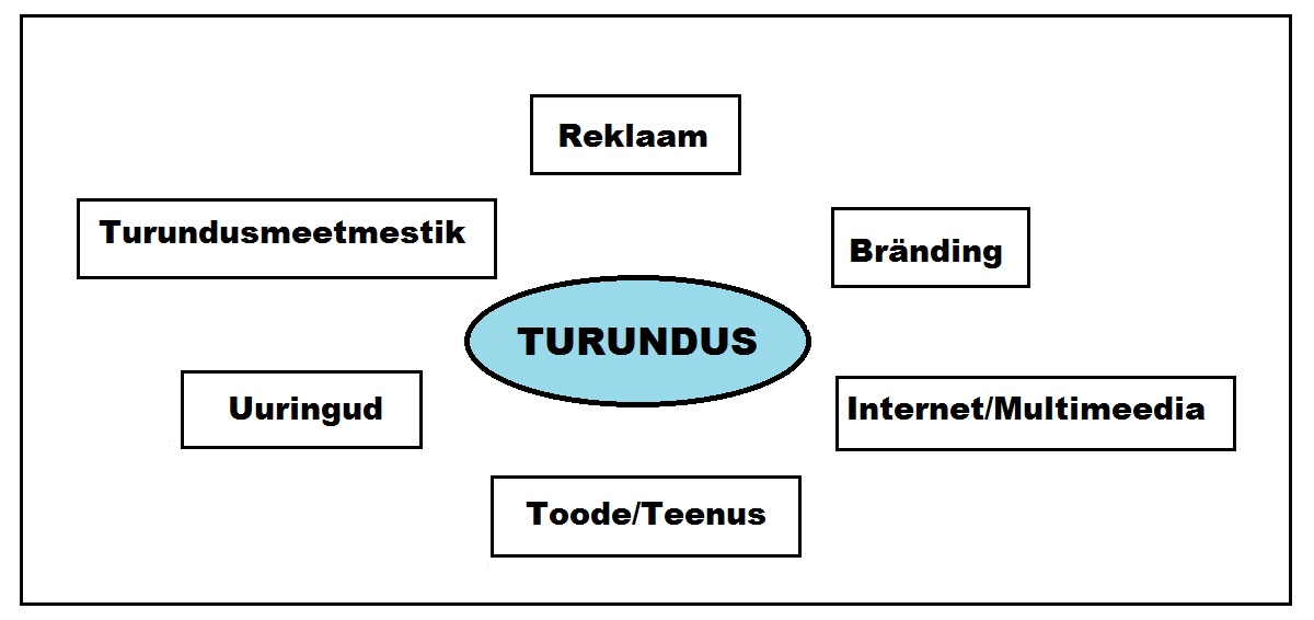 Turundus ühendab mitmeid erinevaid valdkondi omavahel.